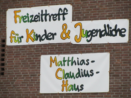 Hausschild - MCH Sennestadt